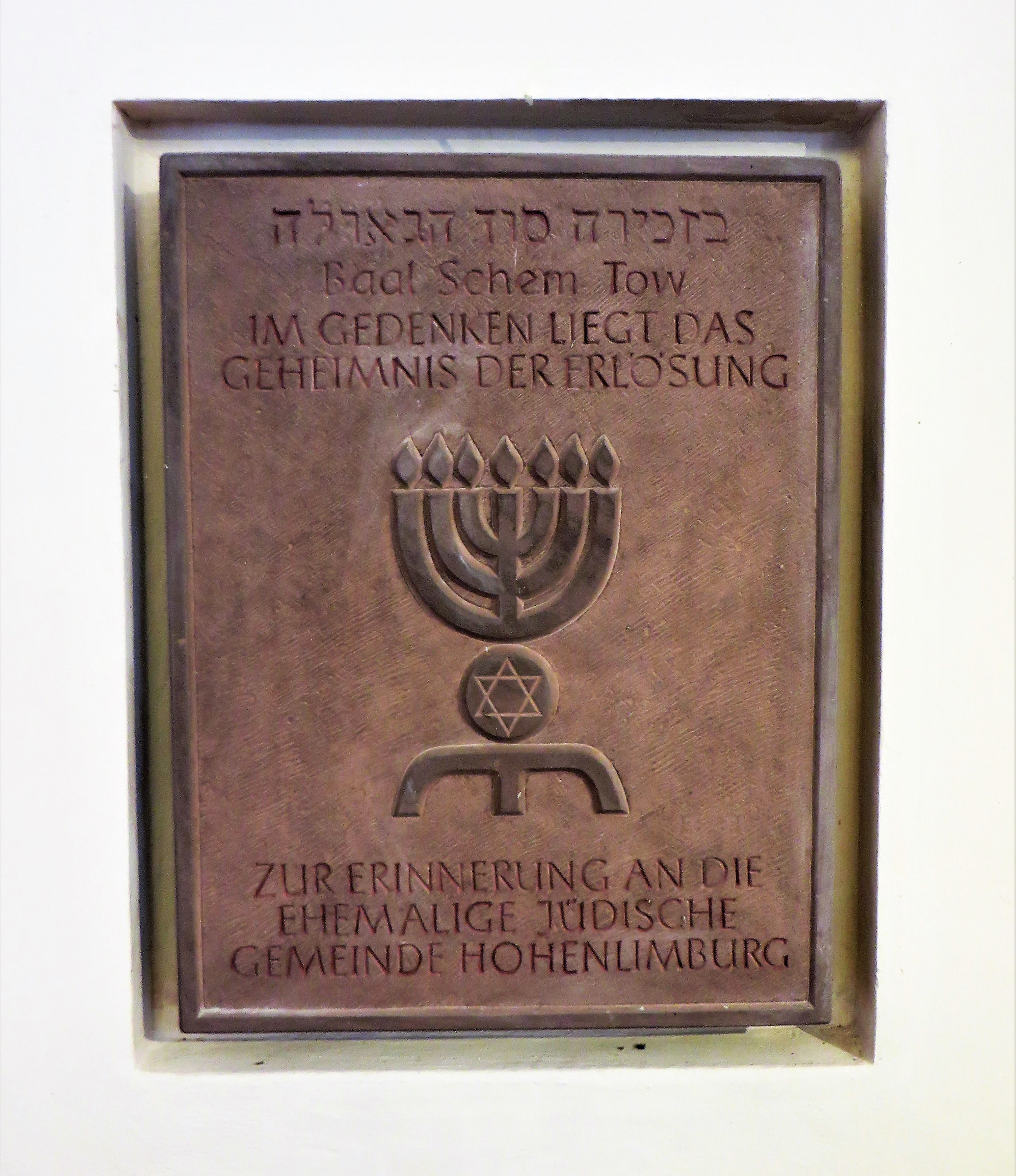 Gedenktafel in der Alten Synagoge Hohenlimburg. Mahn- und Gedenkstätte sowie Christlich-Jüdisches Begegnungszentrum der Stadt Hagen. – In der Grafschaft Limburg ist erstmalig 1694 die Wohnsitznahme eines Juden überliefert. Um 1700 nahm mit gräflicher Erlaubnis die Ansiedlung von Juden weiter zu. 1782 genehmigte der Graf der jüdischen Gemeinde auch die Einrichtung einer Synagoge in Limburg. Eine jüdische Schule existierte bereits zu dieser Zeit. 1843 gab es 115 Juden in Limburg. 1870 konnte die gewachsene Gemeinde, auch durch christliche Spender, die heute unter Denkmalschutz stehende größere Synagoge errichten. Ab 1933 mit der Machtübernahme der NSDAP änderte sich das Leben der jüdischen Mitbürger dramatisch. 1934 gab es nur noch 55 Gemeindemitglieder (Vorsitzender: Moritz Rosenberg). Nach einem Demolationszug durch Hohenlimburg am 10. November 1938 und den immer stärker werdenden Repressalien des NS-Regimes emigrierten viele, aber mindestens 16 jüdische Mitbürger wurden deportiert und in verschiedenen Konzentrationslagern ermordet. Im Mai 1942 war Hohenlimburg „Judenfrei“.